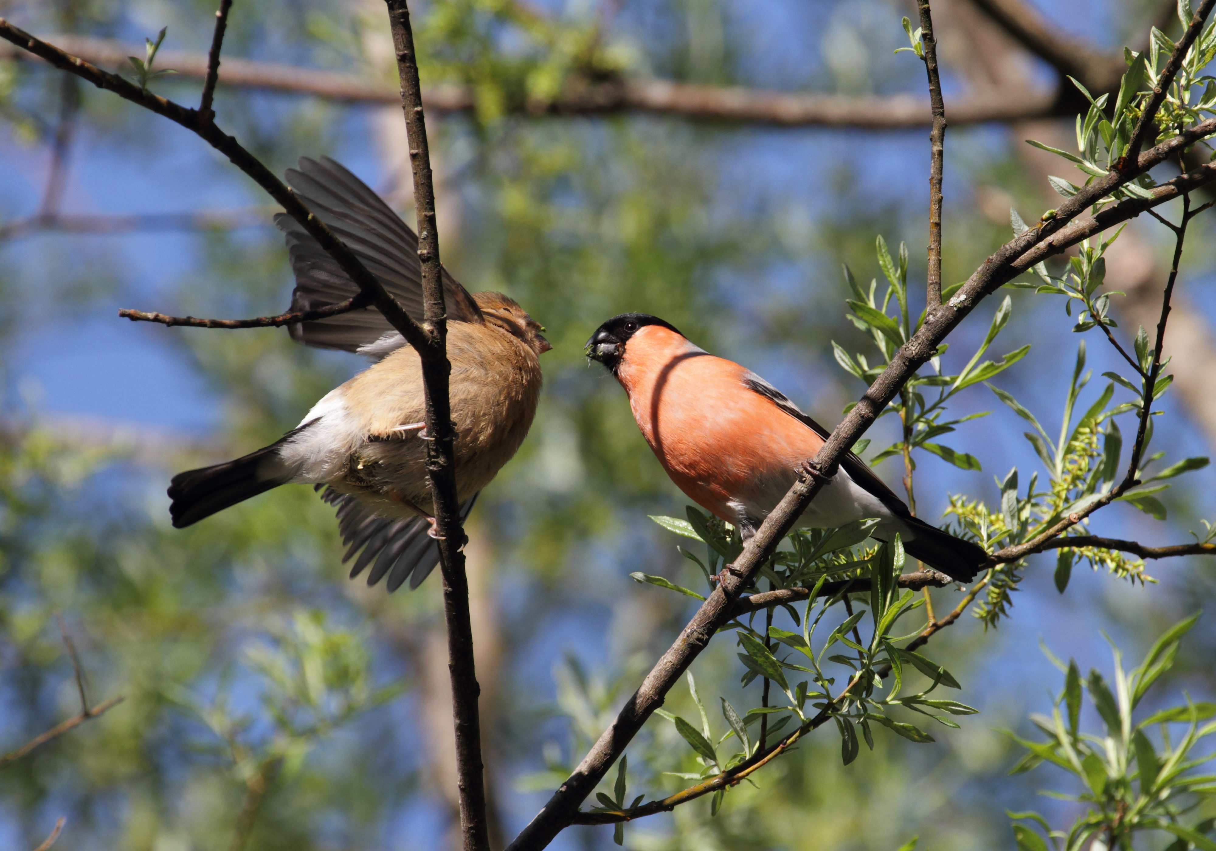 Ein Gimpel füttert einen Jungvogel in Wildalpen in der Steiermark.